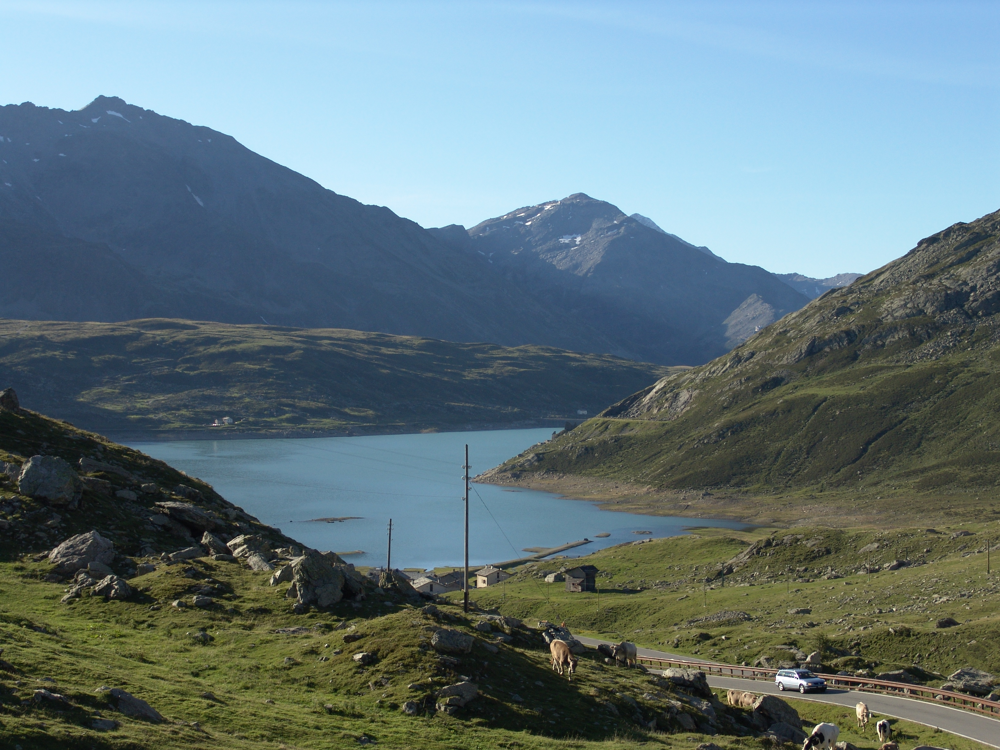 Splügen Pass